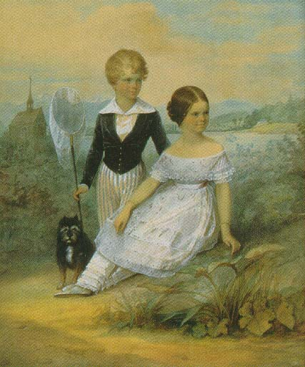 Elisabeth (11 Jahre) mit ihrem Bruder Karl Theodor und dem Hund Bummerl